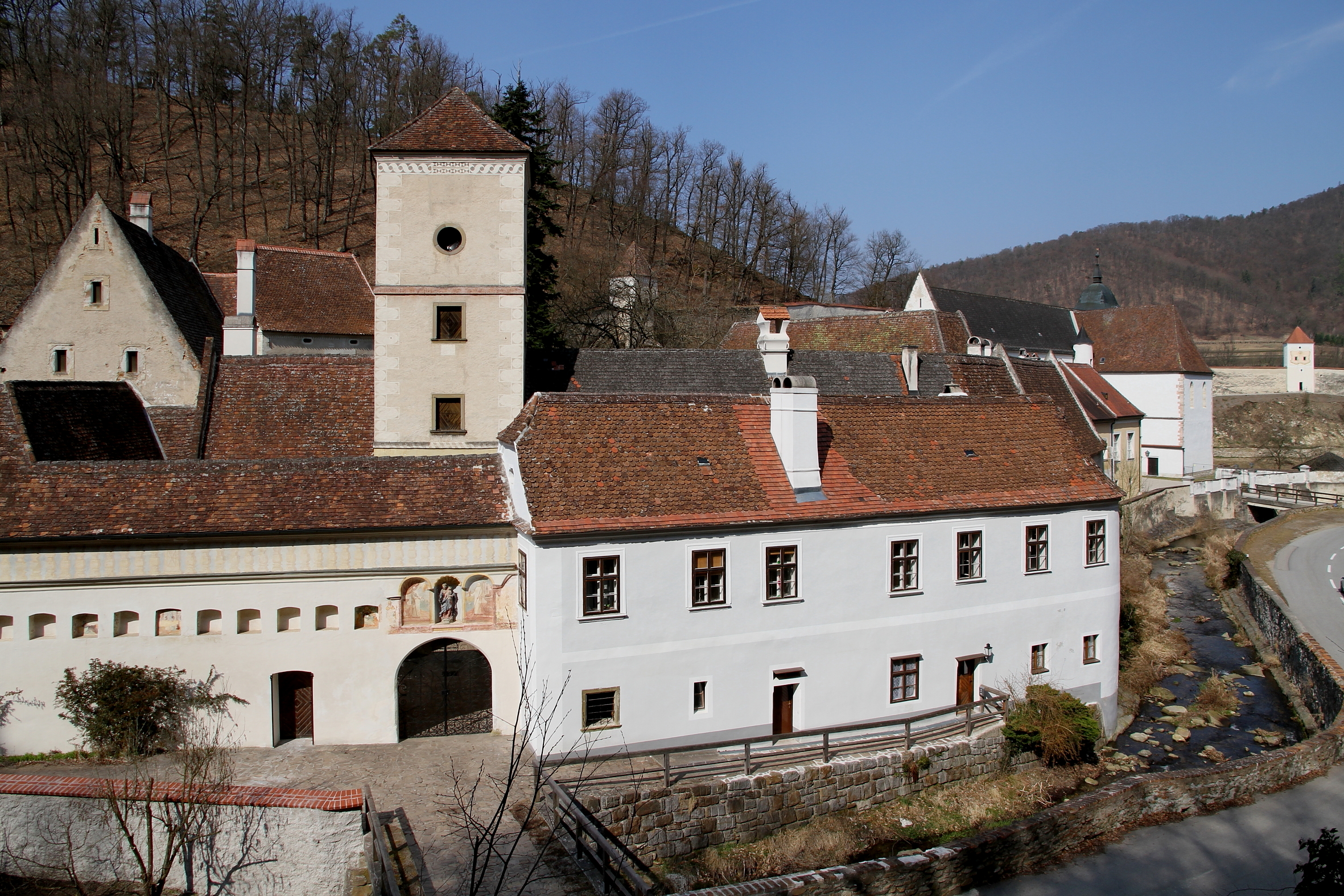 Ostseitige Ansicht der ehemaligen Kartause Aggsbach in der Ortschaft Aggsbach-Dorf, ein Ortsteil der niederösterreichischen Marktgemeinde Schönbühel-Aggsbach.